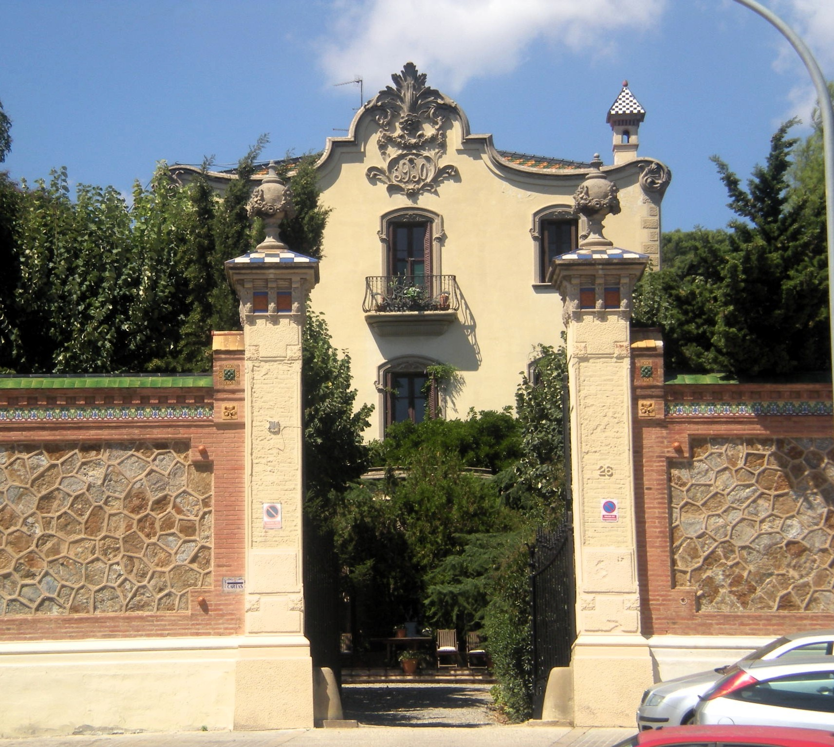 Can Mascaró, Horta-Guinardó, Barcelona